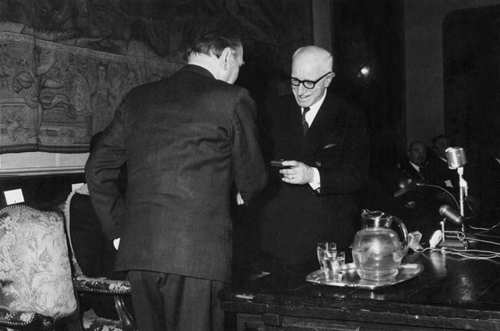 Jorge Luis Borges es nombrado miembro de la Academia Argentina de Letras. Recibe la medalla del Presidente de la Academia Dr. Jose A. Oria